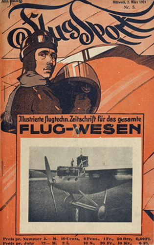 Titelseite der Flugsport vom 2. März 1921; XIII. Jahrgang